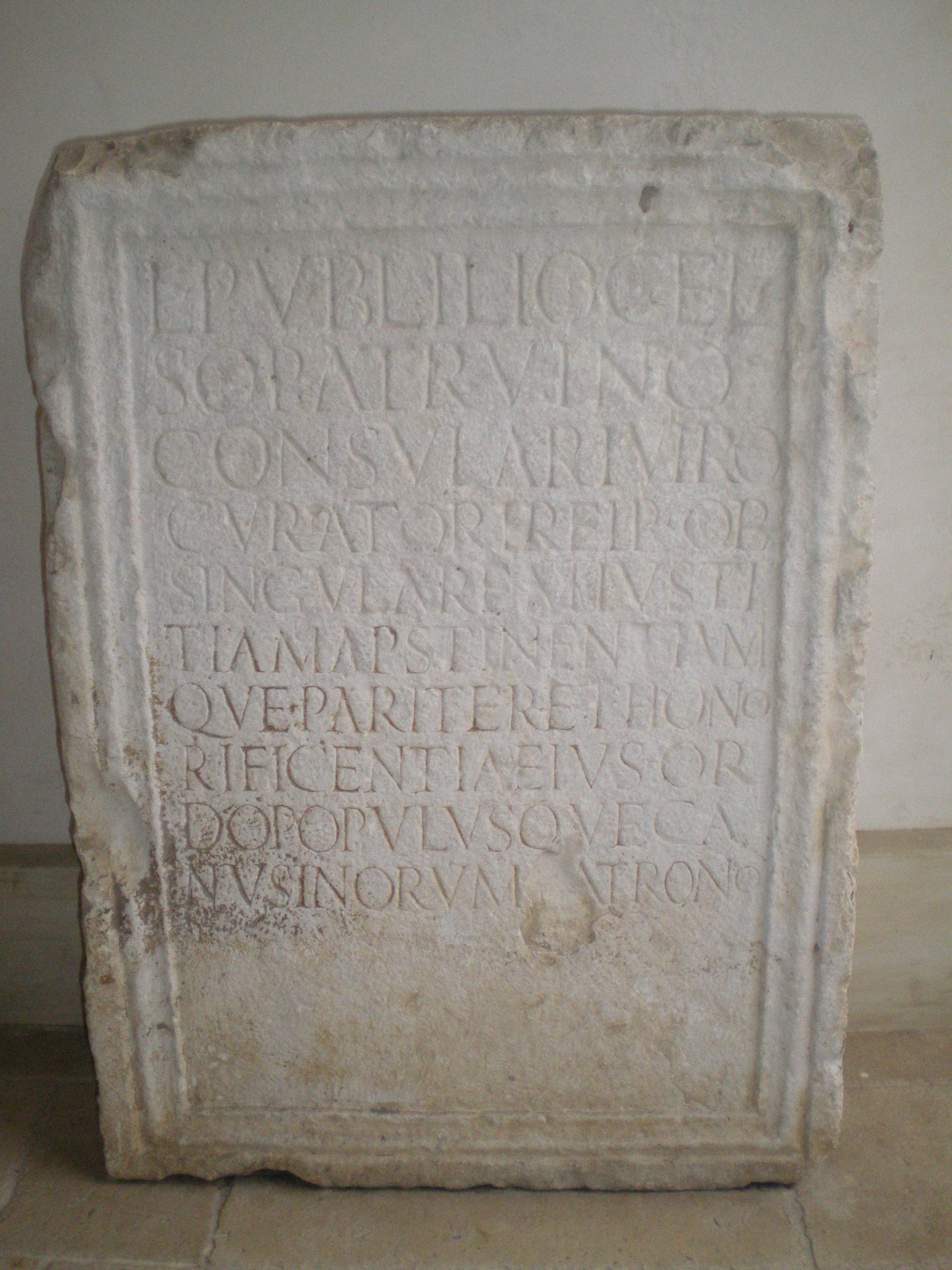 Lastra onoraria dedicata al console ed amministratore di Canosa L. Publilio Celso Patruino (Cerignola - FG).